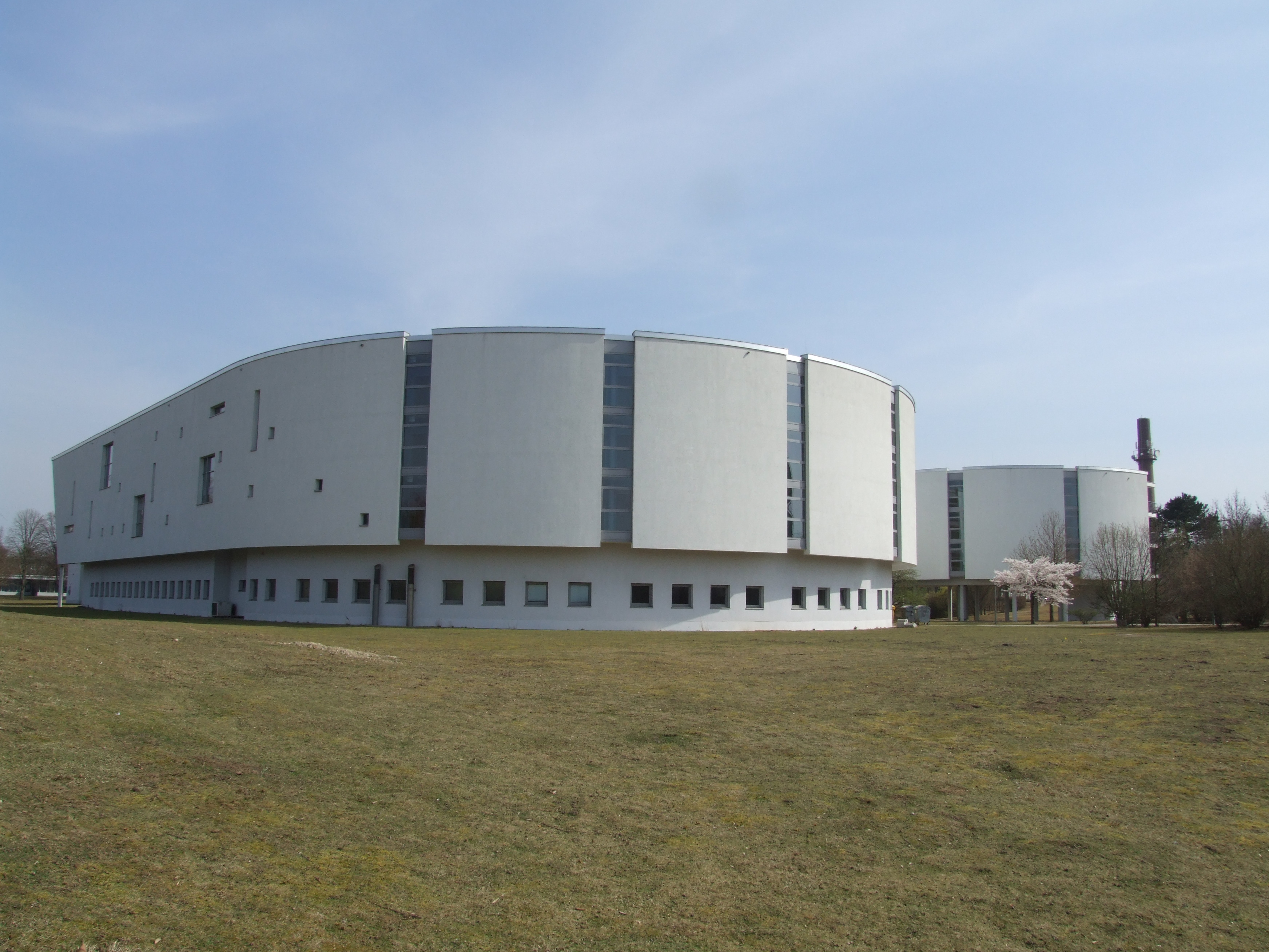 Universität Speyer, Freiherr-vom-Stein-Str. 2